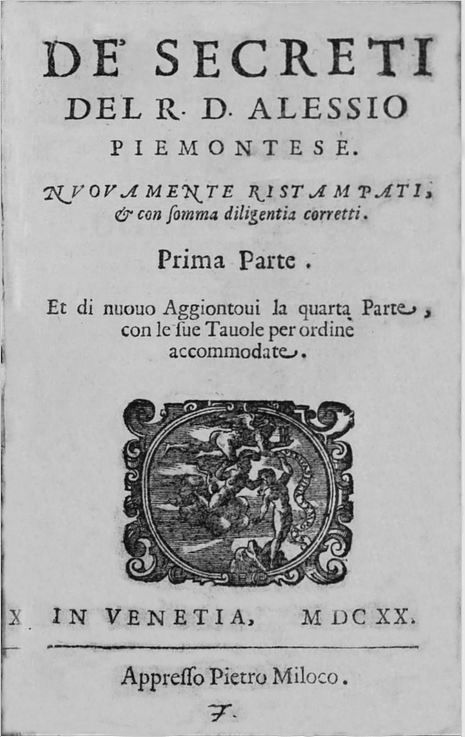 Page de titre De secreti